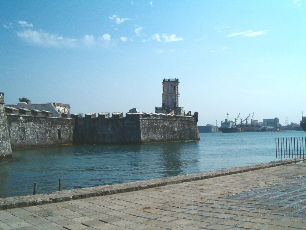 Fuerte de San Juan de Ulua Ubicado en la Ciudad de Veracruz, Ver. México